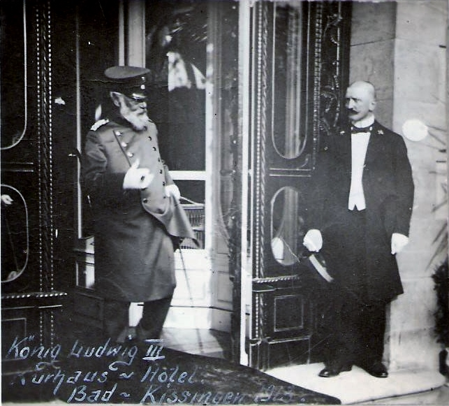 Prinzregent Ludwig III. am 15./16. Mai 1913 in Bad Kissingen vor dem Eingang zum Königl. Kurhaushotel (Kurhausstraße). Anlass seines zweitägigen Kissingen-Besuchs war die Einweihung des Regentenbaus.